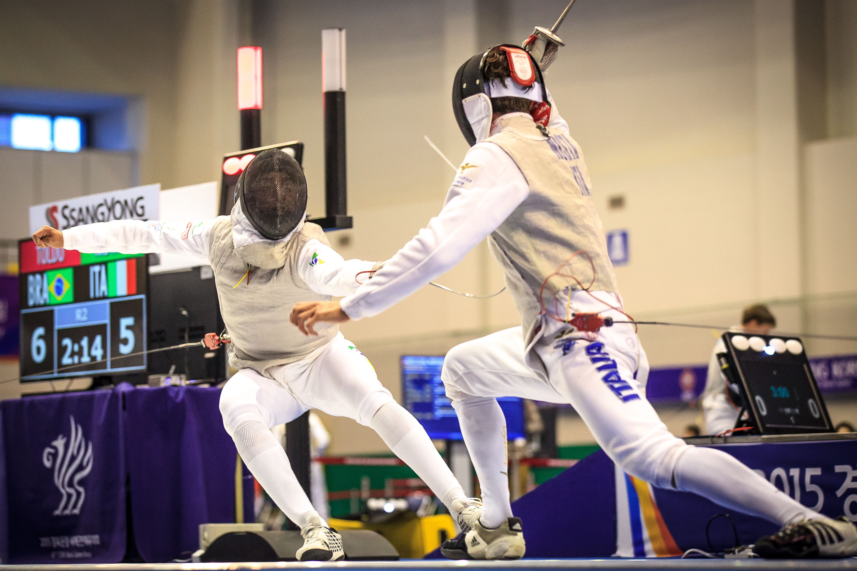 Fase elimiatória da esgrima (florete) em Mungyeong. Foto: Sgt Johnson Barros